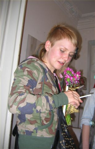 Dorota Masłowska (b. 1983), Polish writer